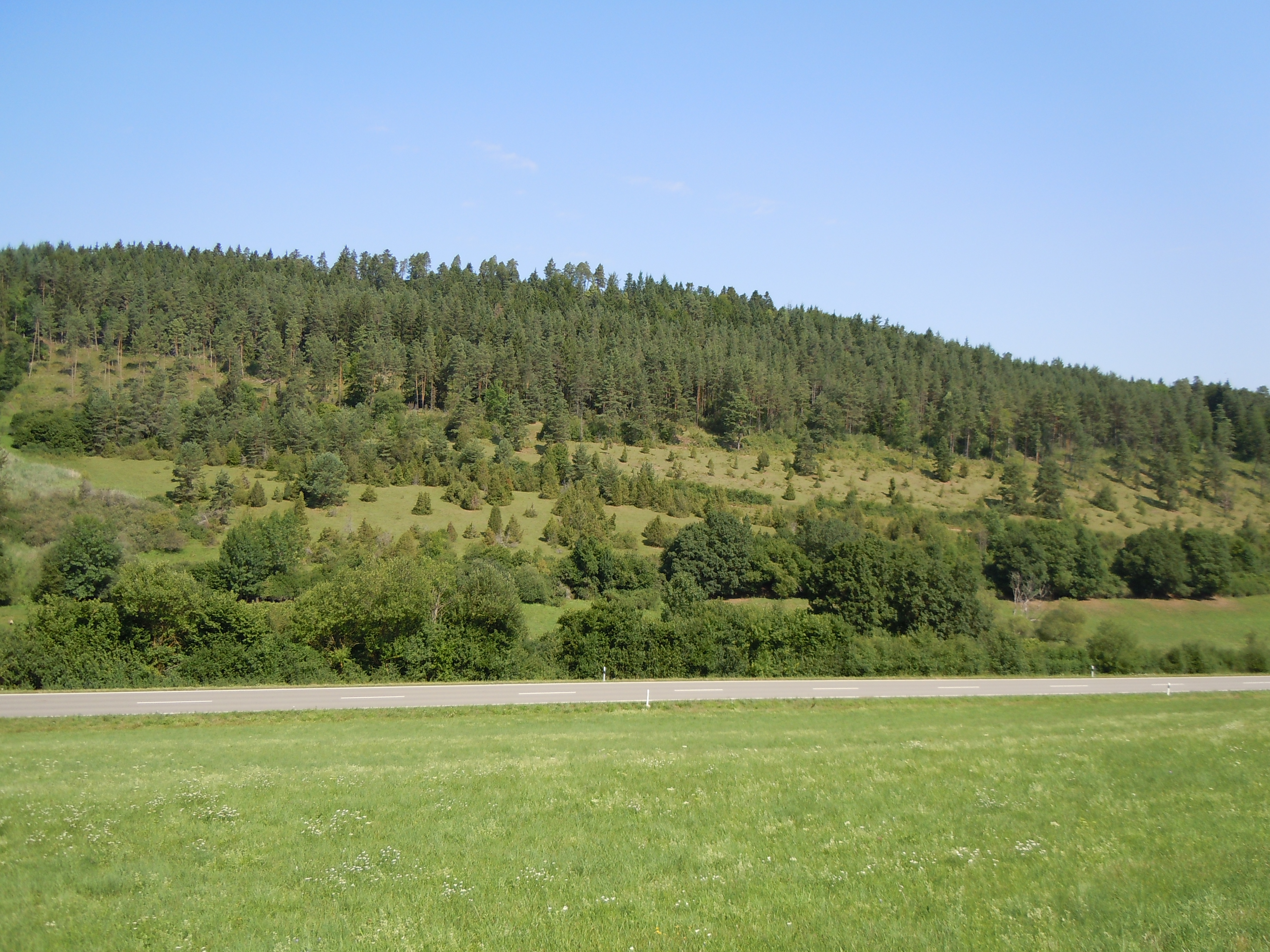 Südhang des Haiterbachtals mit Wacholderheide